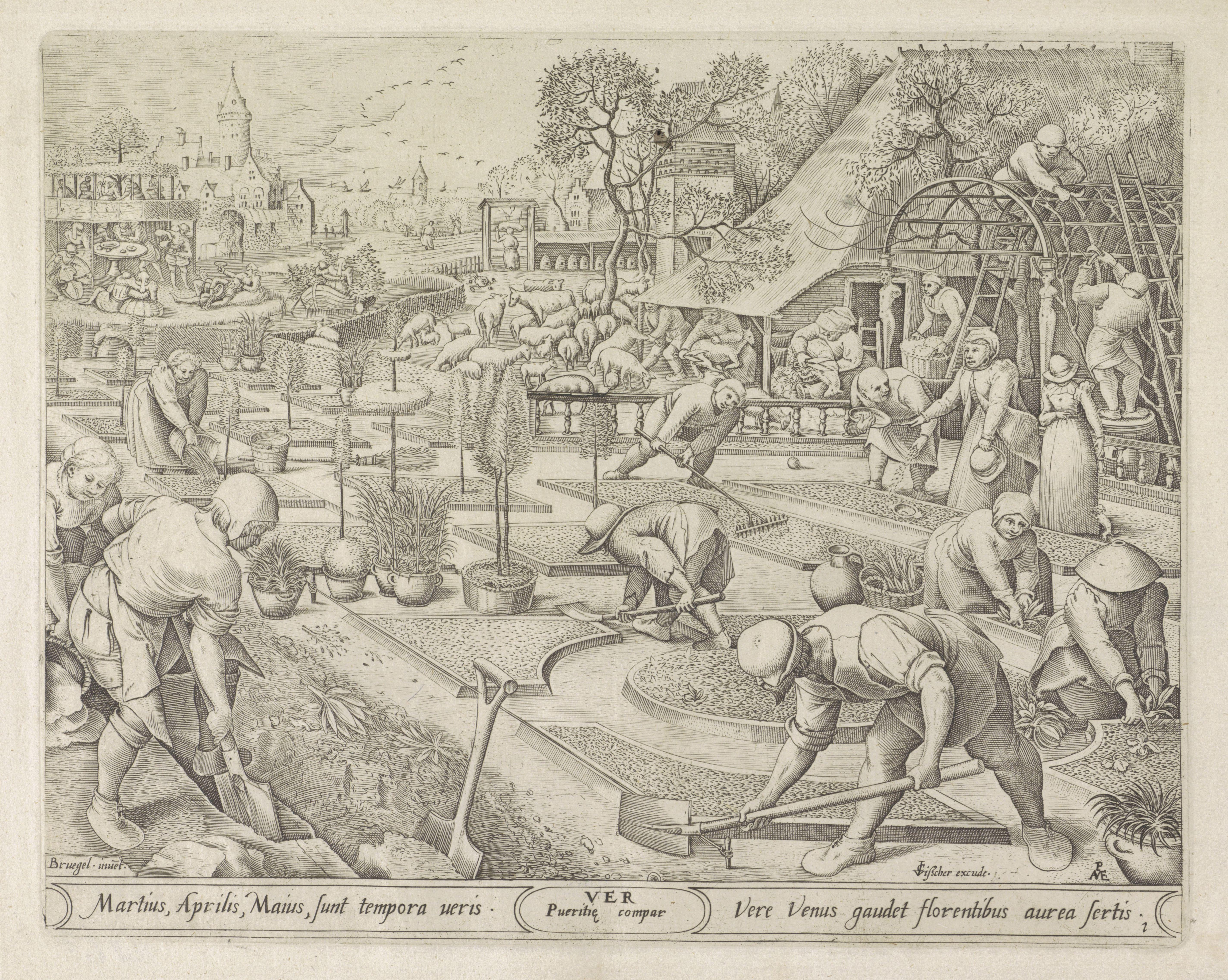 IdentificatieTitel(s): LenteVer (titel op object)De vier seizoenen (serietitel)Objecttype: prent Serienummer: 1/4Objectnummer: RP-P-1891-A-16532Catalogusreferentie: New Hollstein Dutch 29-2(3)Opmerking: Pieter Bruegel the elderHollstein Dutch 63Opmerking: Pieter van der HeydenRiggs 49Opschriften / Merken: verzamelaarsmerk, verso, gestempeld: Lugt 2228Omschrijving: Het seizoen van de lente: de maanden maart, april, mei. Het planten en zaaien, spitten en harken in een aangelegde tuin. Rechts een dame die orders geeft aan de werkers. Op de achtergrond het scheren van schapen en linksachter een etend en drinkend gezelschap in een prieel. Onder de voorstelling een tekst in het Latijn.VervaardigingVervaardiger: prentmaker: Pieter van der Heyden (vermeld op object)naar tekening van: Pieter Bruegel (I) (vermeld op object)uitgever: Claes Jansz. Visscher (II) (vermeld op object)Plaats vervaardiging: AmsterdamDatering: 1570 en/of 1601 - 1652Fysieke kenmerken: gravureMateriaal: papier Techniek: graveren (drukprocedé)Afmetingen: plaatrand: h 230 mm × b 288 mmOnderwerpWat: spring ~ human activities (the four seasons of the year)gardeningoutdoor gathering, 'dÃ©lices Ã la campagne'shearing (sheep)Verwerving en rechtenVerwerving: aankoop 1891Copyright: Publiek domein